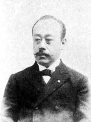 徳川篤敬（1855-1898）